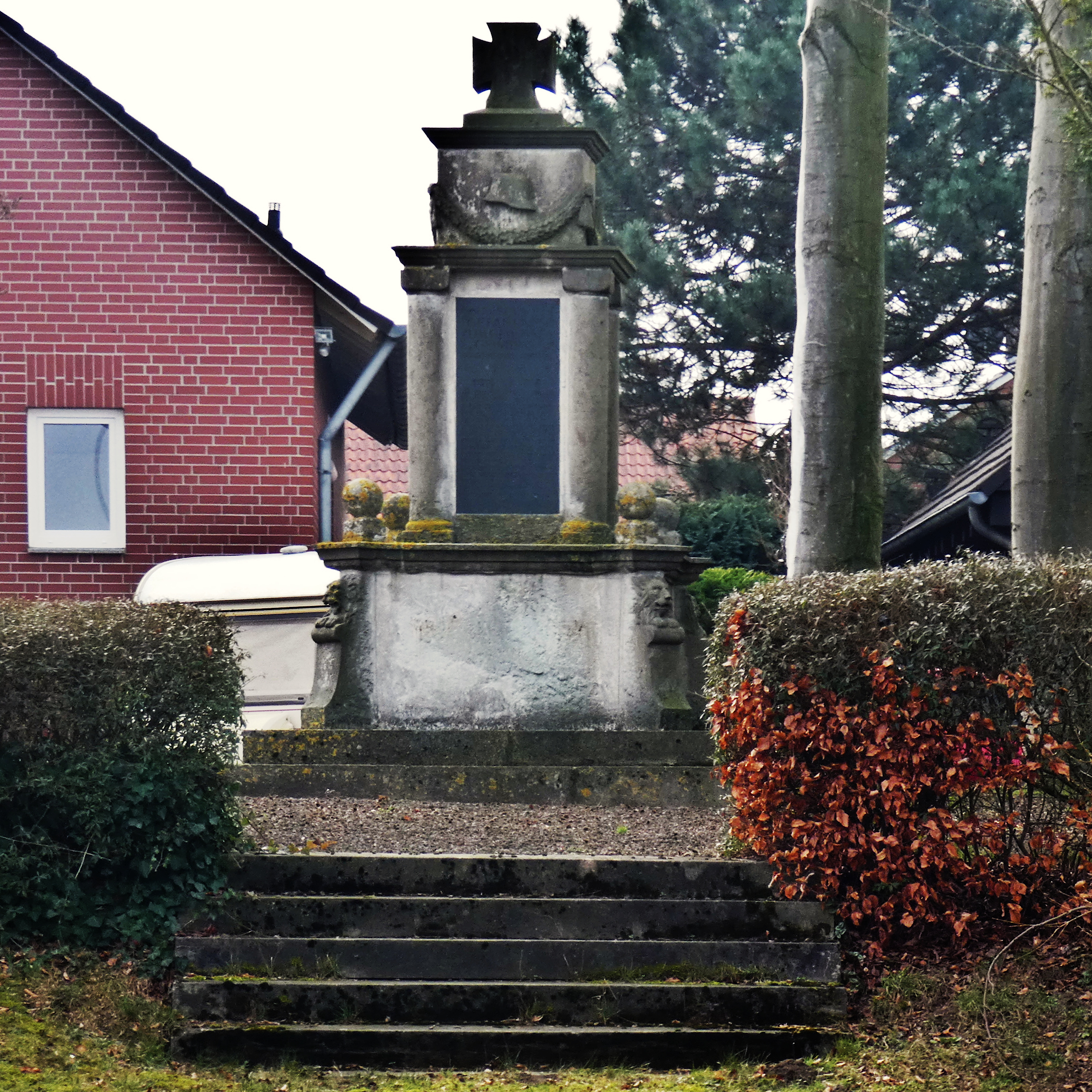 Ehrenmal für Northens Weltkriegsgefallene.